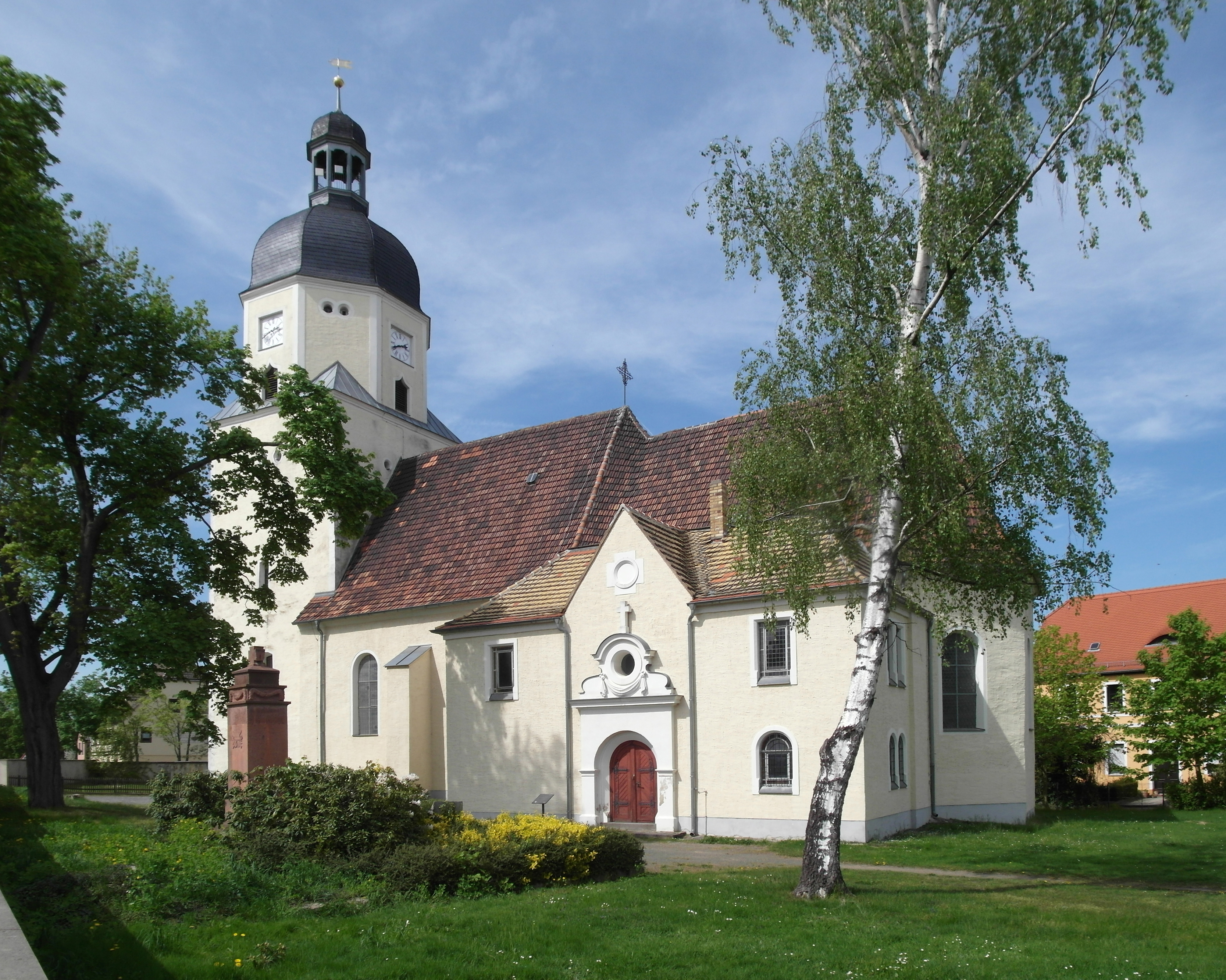 28.04.2018 04808 Thallwitz: Kirche (GMP: 51.433257,12.681055). Im Kern ist das Gebäude, das 1440 im Osten einen langgestreckten spätgotischen Chor erhielt, eine romanische Saalkirche. Das Turmuntergeschoss im Westen stammt ebenfalls aus dem 15. Jahrhundert, der barocke Turmabschluss von 1626. Sicht von Südosten. [SAM5665.JPG]20180428300DR.JPG(c)Blobelt